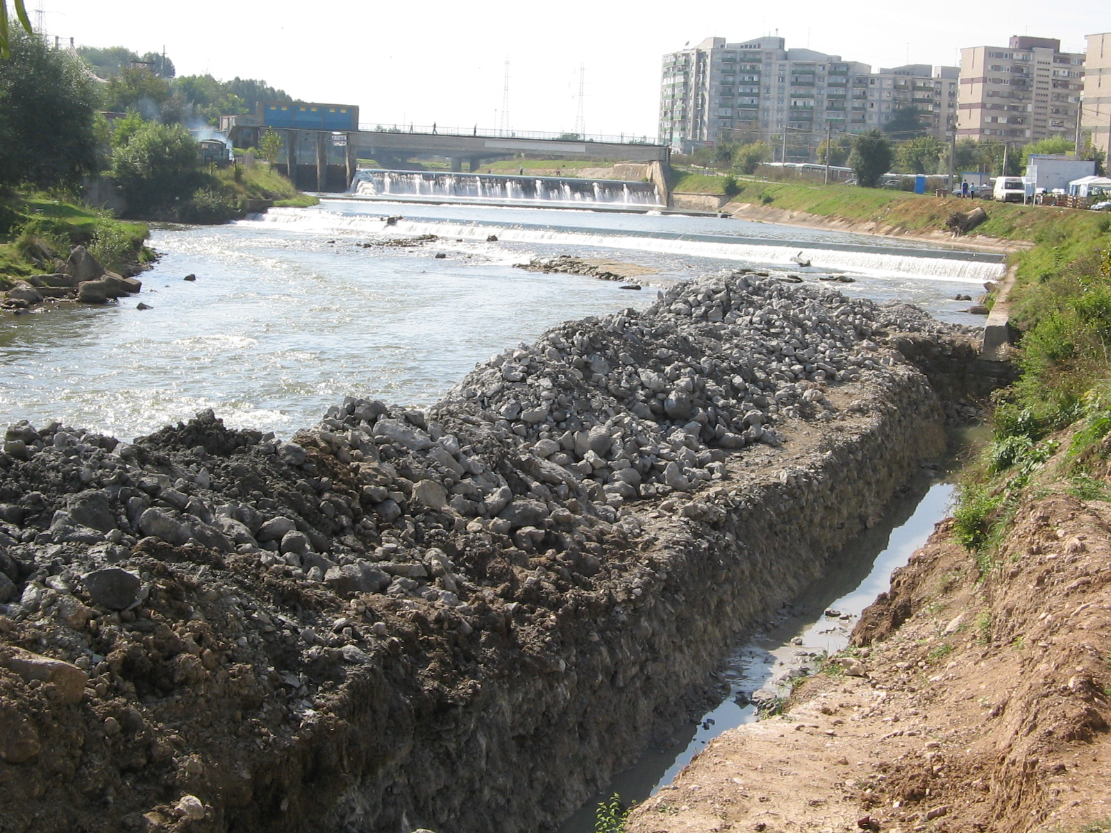 Reamenajarea albiei Someşului Mic (Cartierul Grigorescu, Cluj-Napoca)